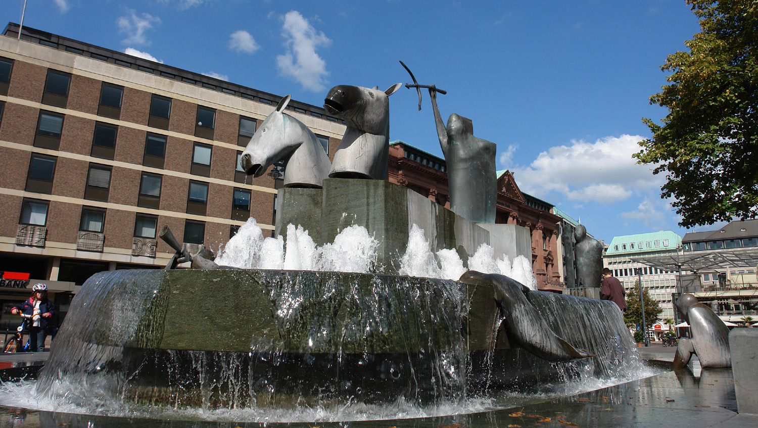 Neptunbrunnen auf dem Domshof in Bremen. Entworfen von Waldemar Otto. k: kunst im öffentlichen raum bremen